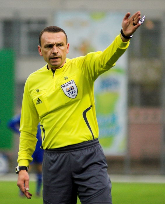 Андрій Арпадович Шандор — украинский футбольный арбитр.